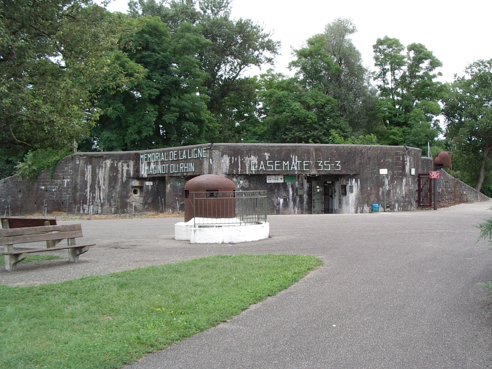 Mémorial de la ligne Maginot, Marckolsheim, Alsace, France